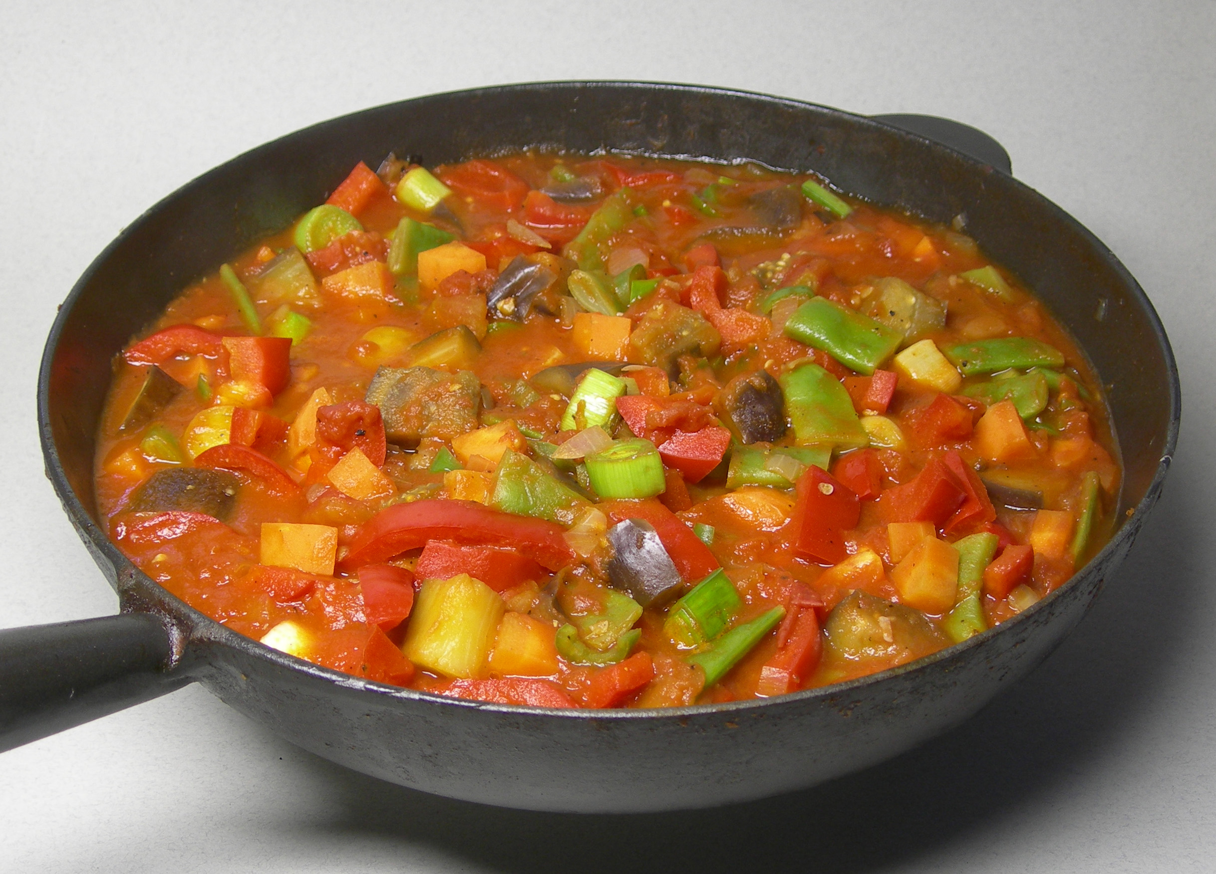 Djuvec